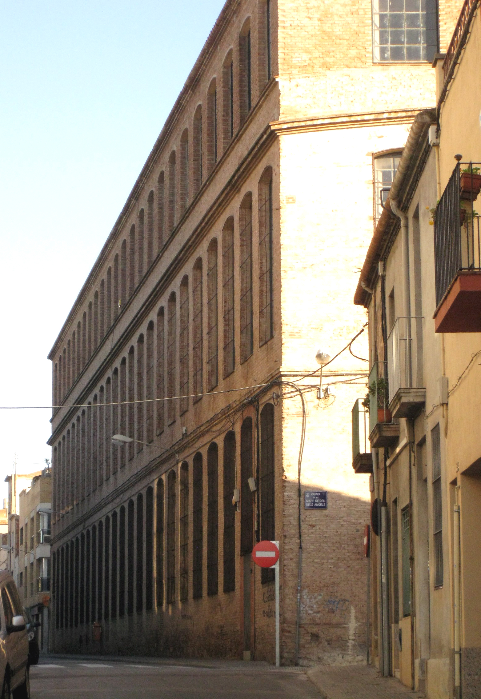 Fàbrica Albinyana Ribas (Terrassa)